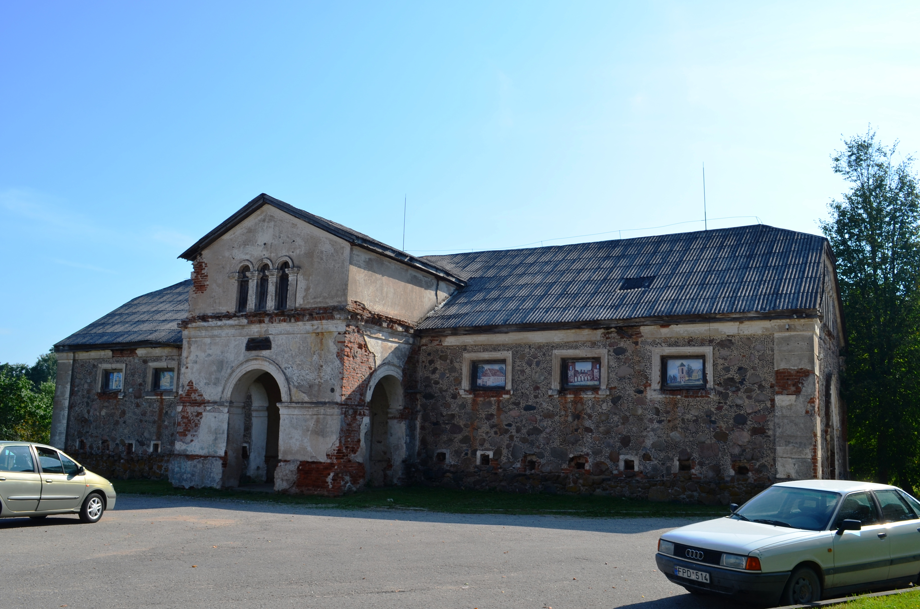 Buvęs sandėlis, Subačius, Kupiškio r.